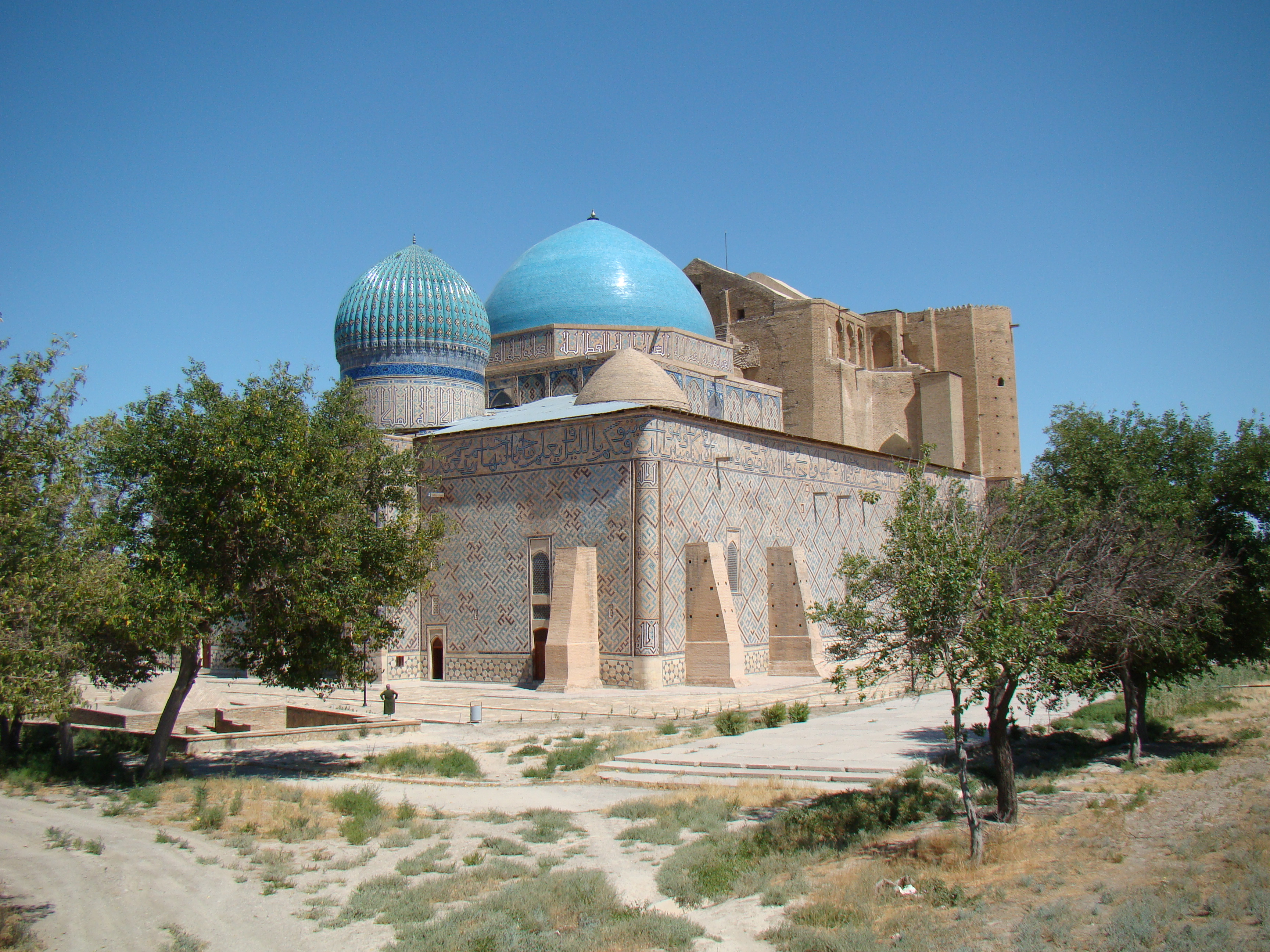 Ханака Ахмеда Ясави.